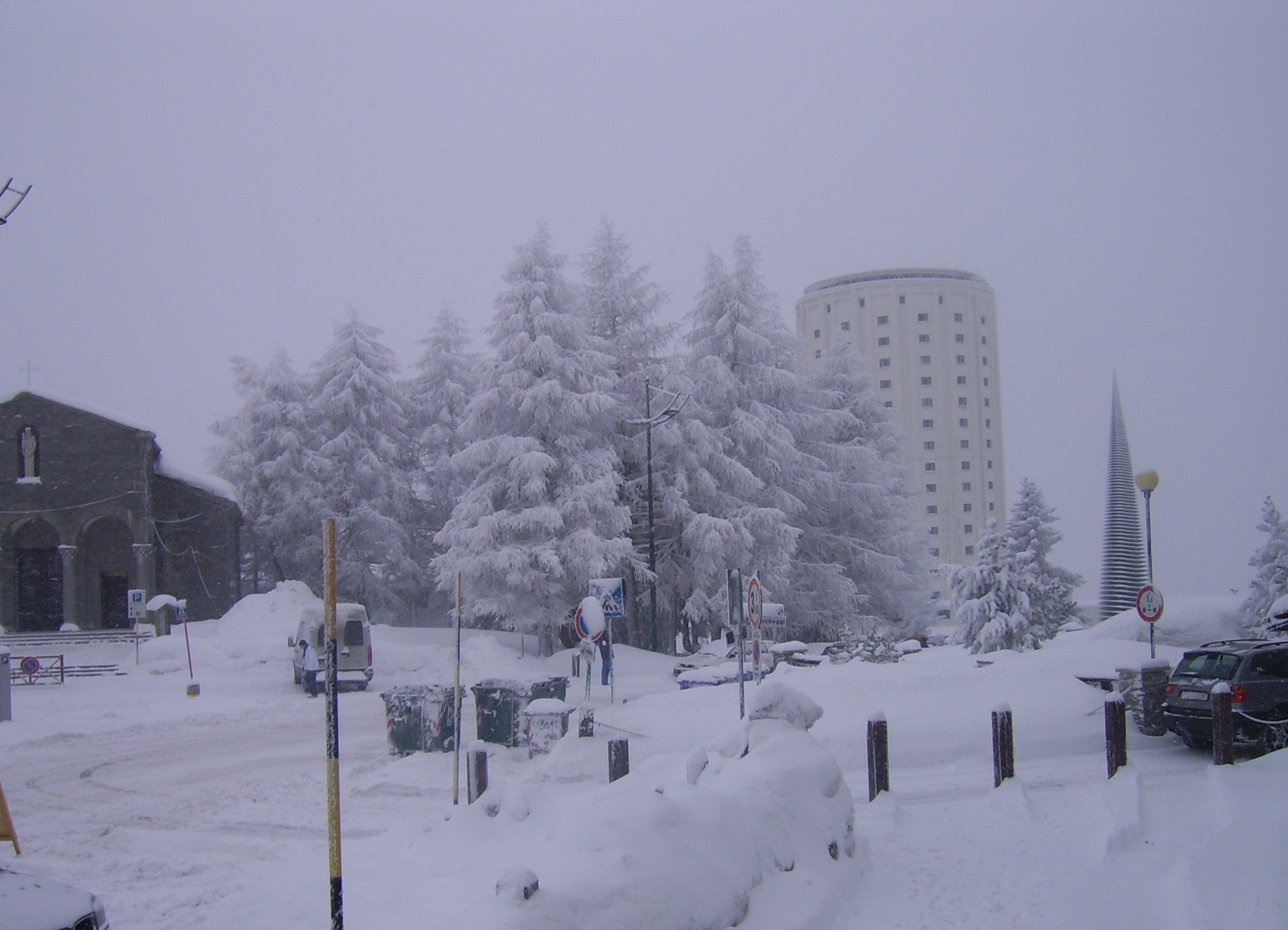 Sestriere Paesaggio Invernale